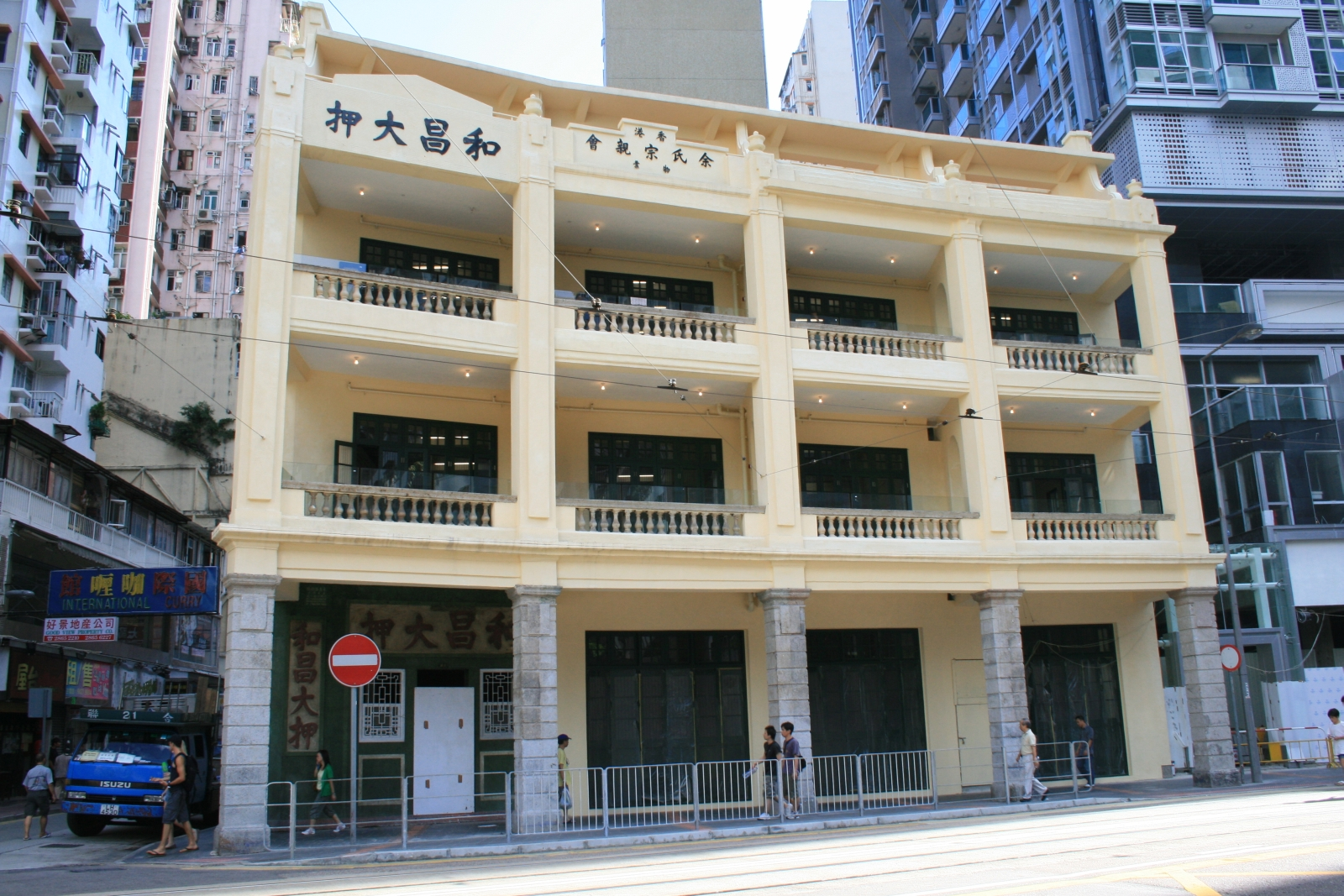 灣仔和昌大押 - Pawnbroker in Hong Kong.